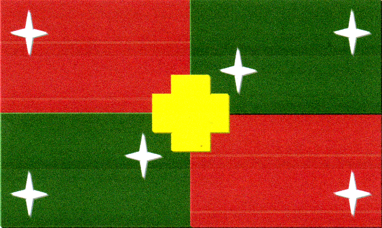 Bandera del propuesto departamento boliviano de Chiquitos y Guarayos.